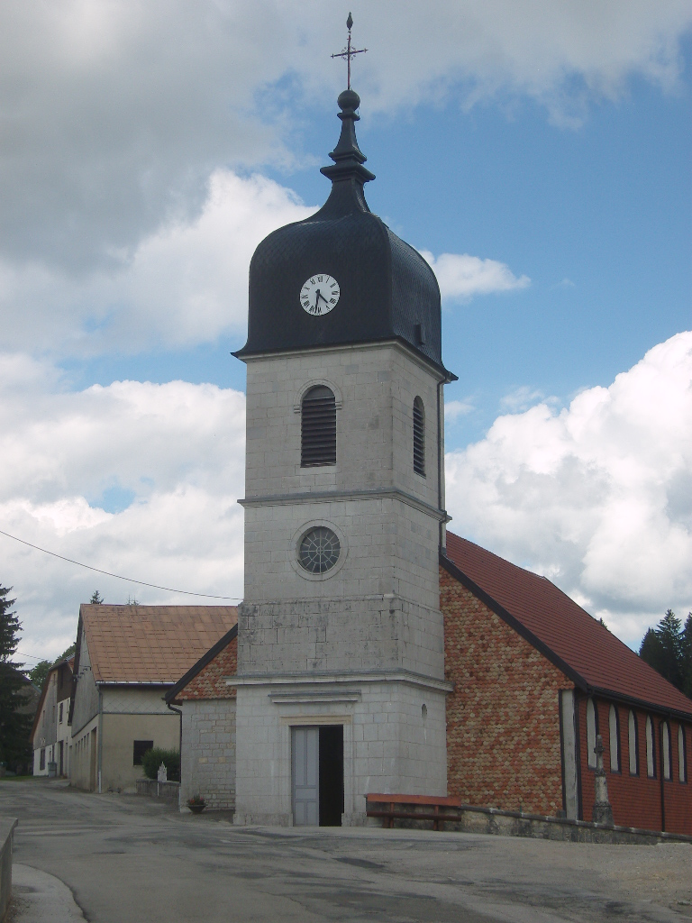 Les Villedieu, église paroissiale Saint-Joseph de 1833